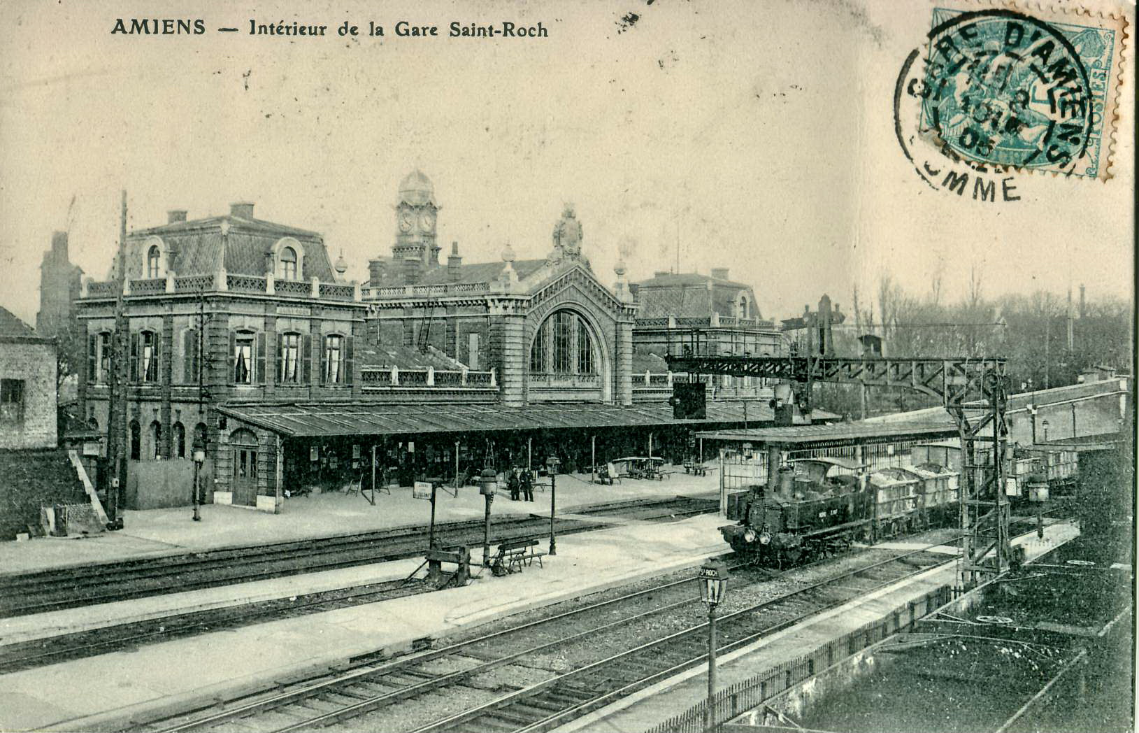 Carte postale ancienne : Intérieur de la Gare d'Amiens-Saint-Roch. Au premier plan, les deux voies de la Ligne Amiens - Rouen (d'ou se détachera la ligne de Canaple hors du cliché à gauche), le courte voie de terminus de la ligne d'Aumale et d'Envermeu (Chemins de fer départementaux de la Somme) et, à l'arrière plan, les voies vers Calais